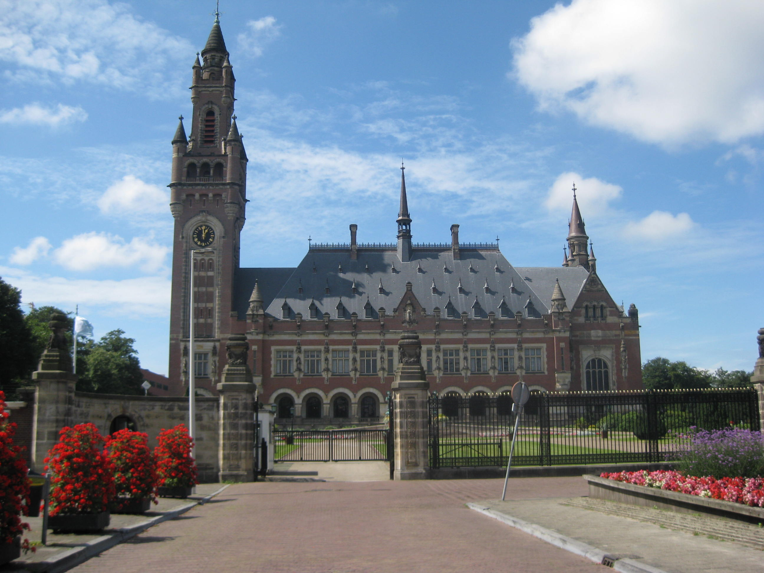 Vredespaleis in Den Haag, Nederland